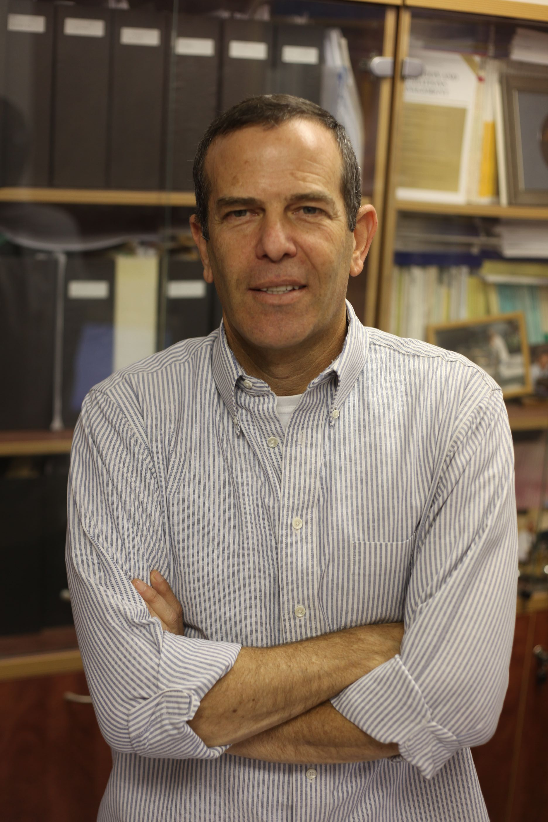 תמונתו של פרופסור גור מושיוב